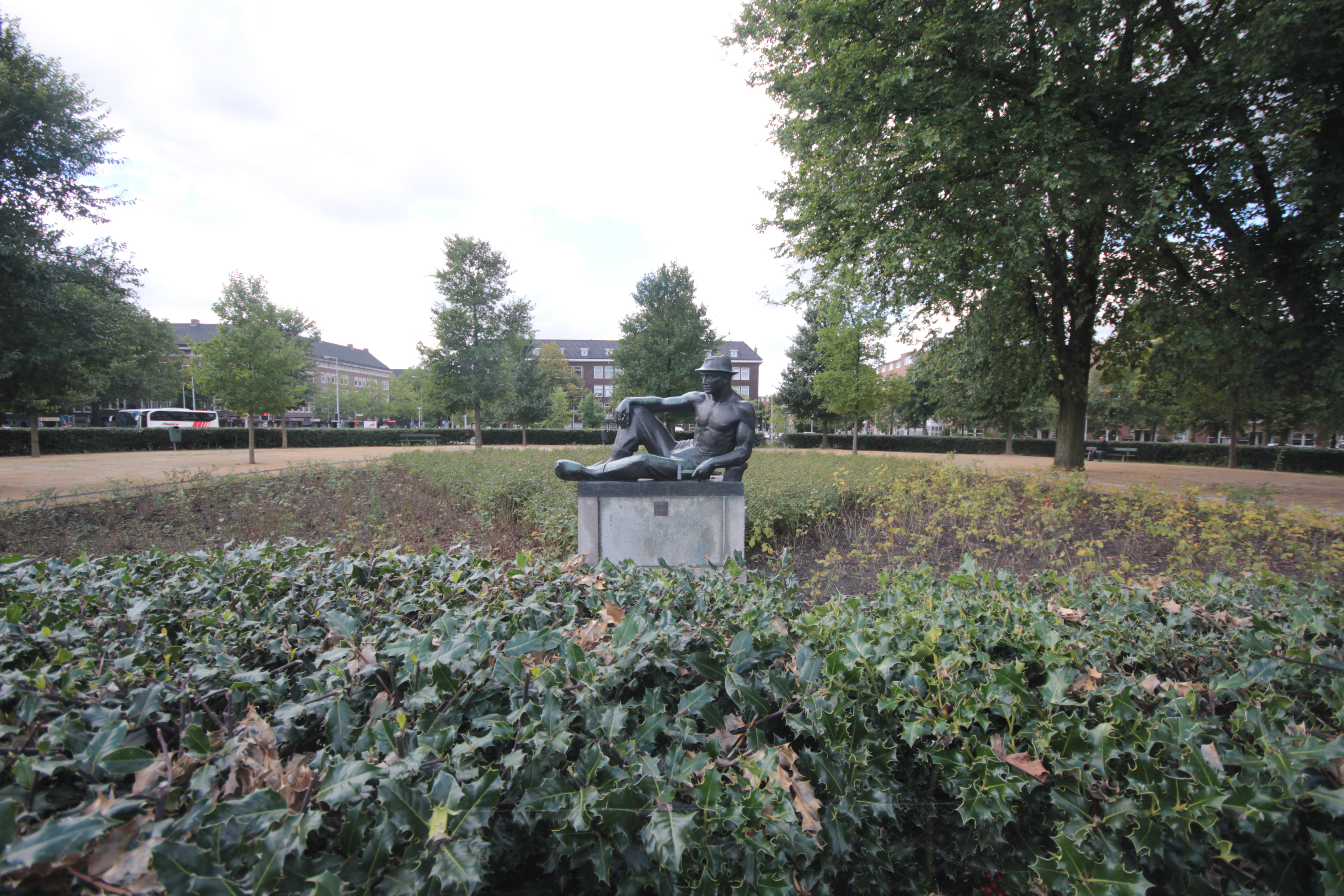 De Rustende Tuinder (1938) van de kunstenaar Jan Havermans in het Jan van Galenplantsoen in Amsterdam-West